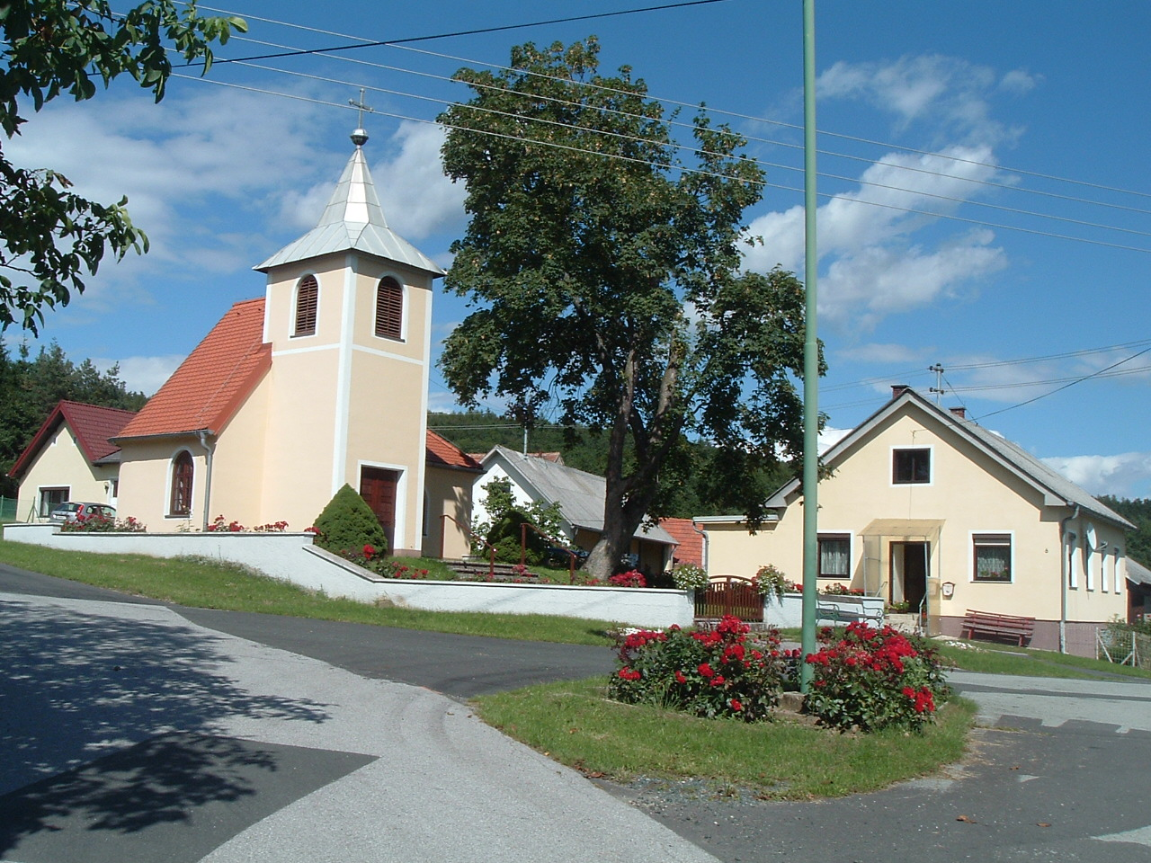 Rauhriegel, Burgenland, Austria